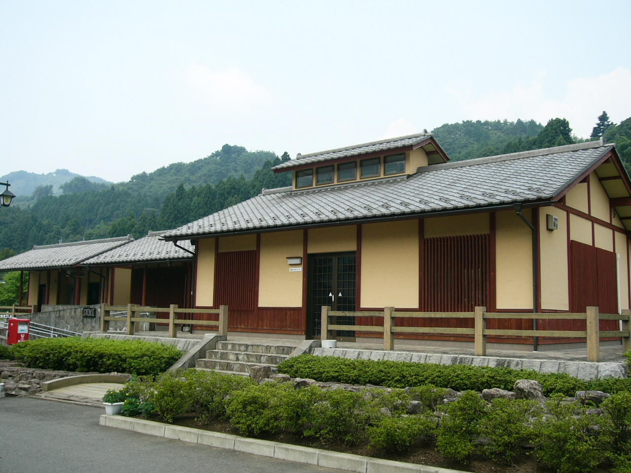 Hanawa Station